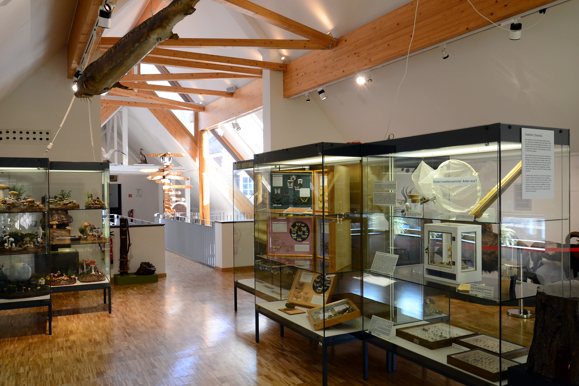 Pfalzmuseum für Naturkunde Bad Dürkheim